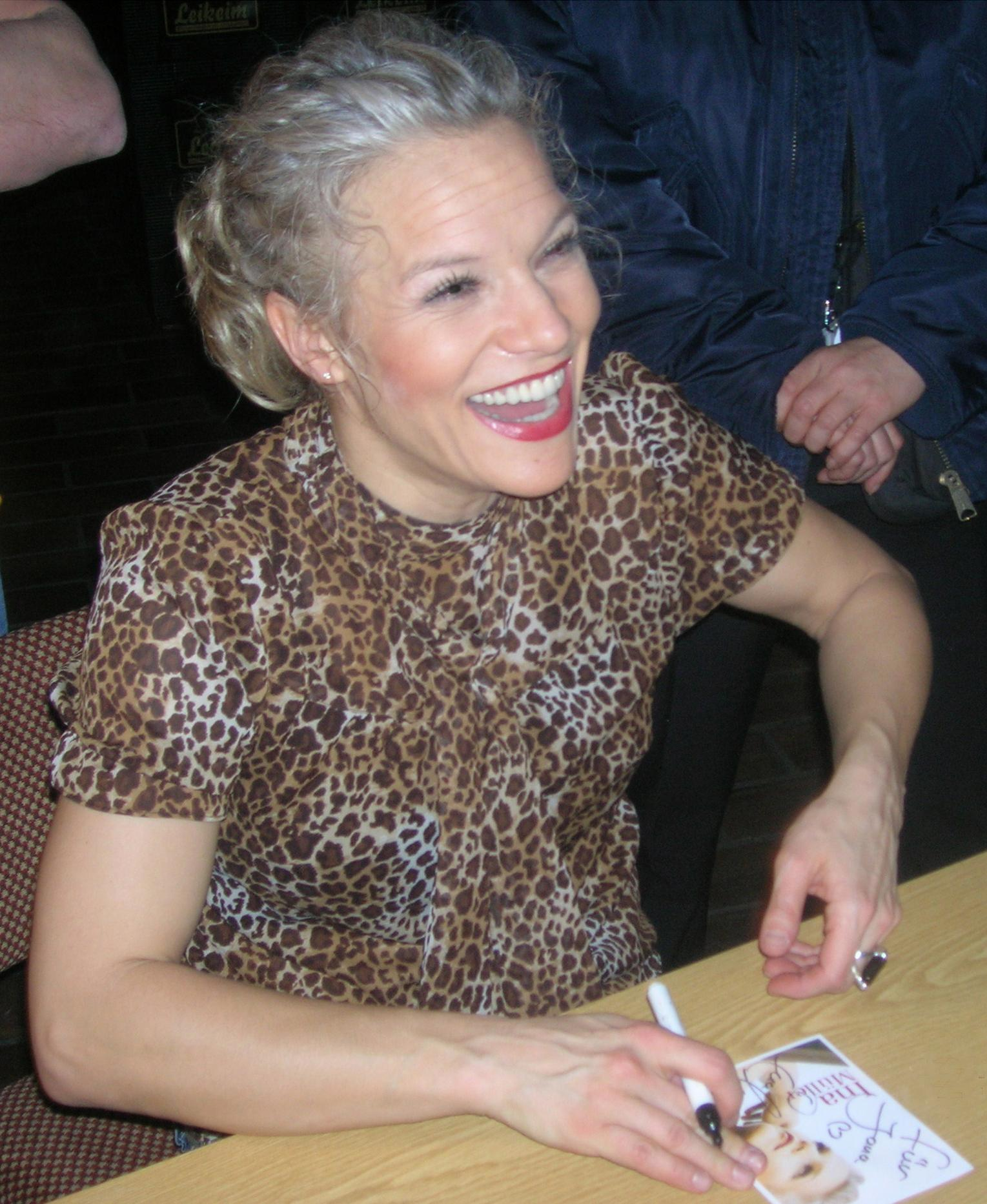 Ina Müller